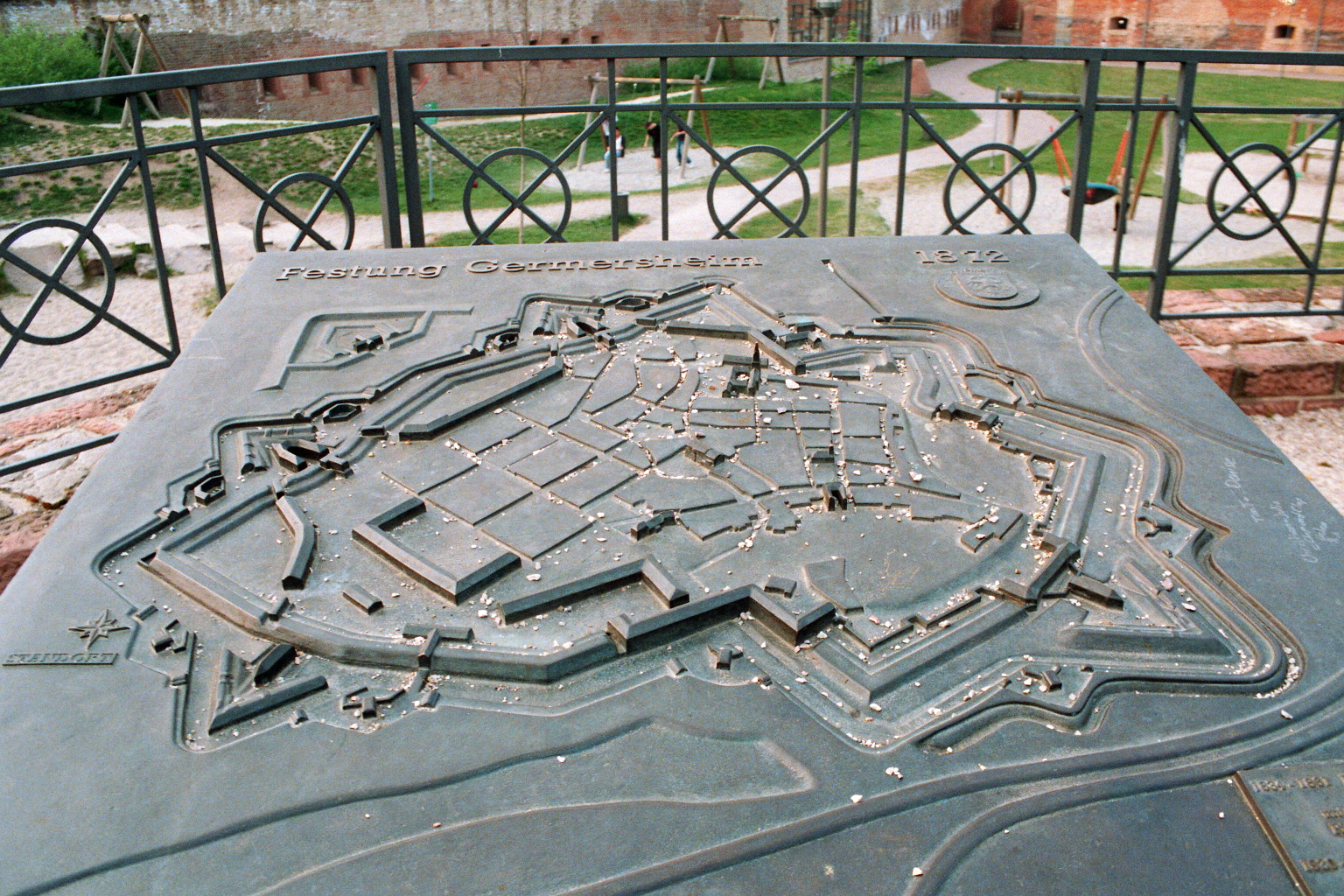 Modell der Festung von Osten aus gesehen.